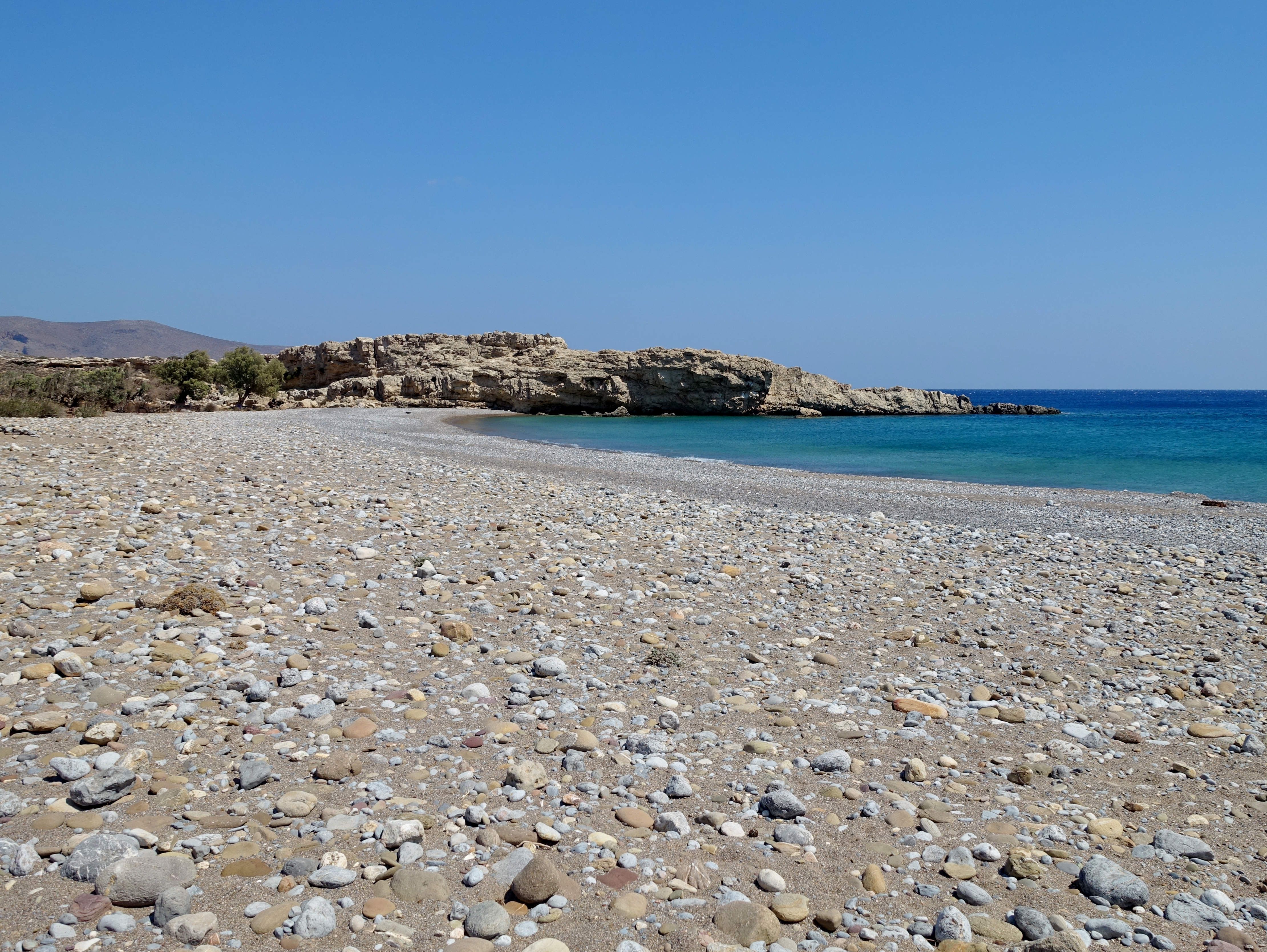 Strand von Karoumes (Παραλία Καρούμες), Gemeinde Sitia, Kreta, Griechenland